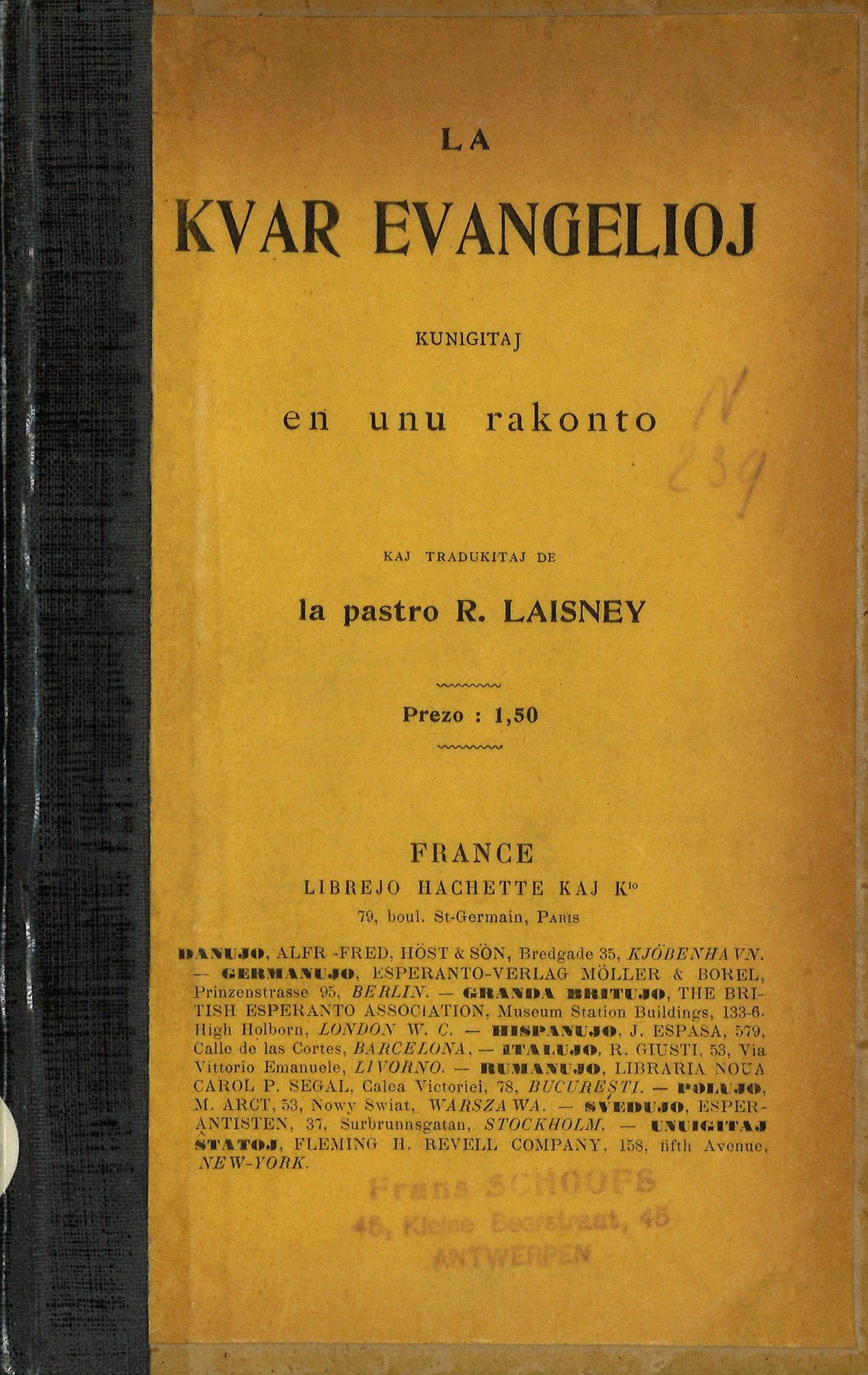 kovrilo de "La Kvar Evangelioj", 1908